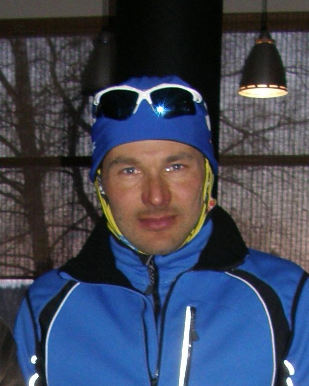 olümpiavõitja Andrus Veerpalu